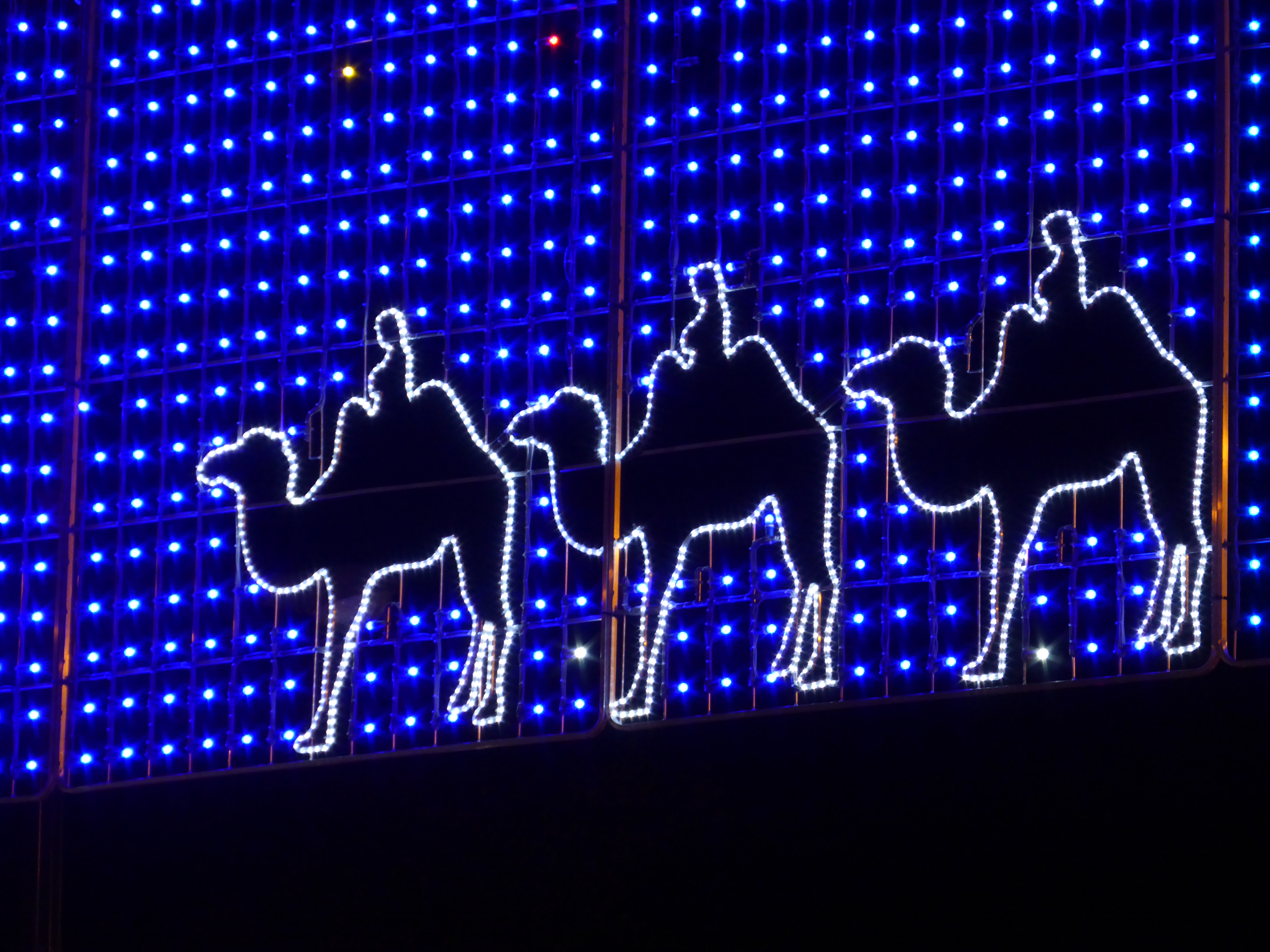 Decoración navideña en la Gran Vía de Madrid, cerca de la Plaza de España. Las tres figuras luminosas representan los Reyes Magos de Oriente, viajando sobre camellos.